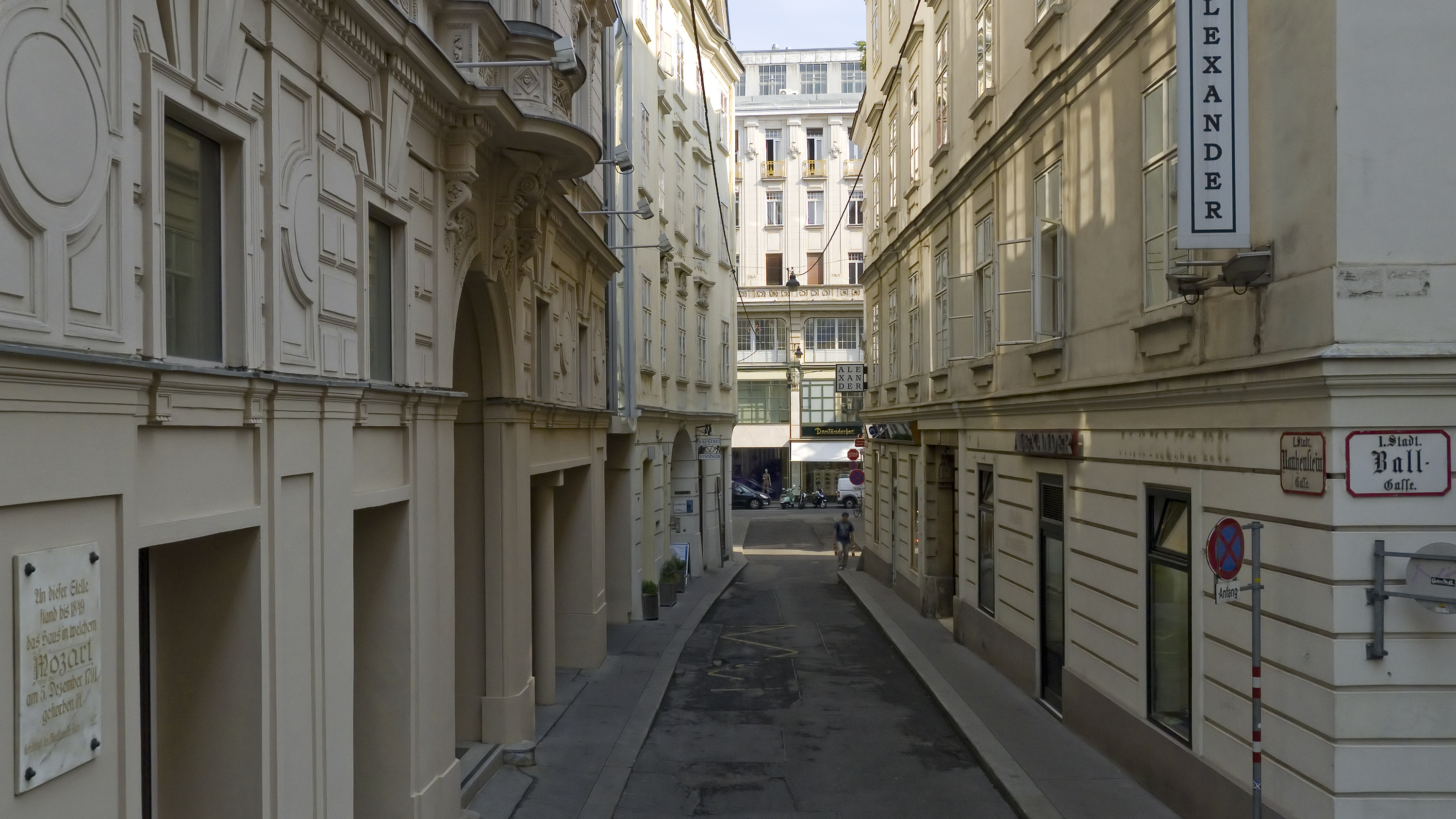 Rauhensteingasse in Wien 1 bei Nr. 5 Richtung Norden